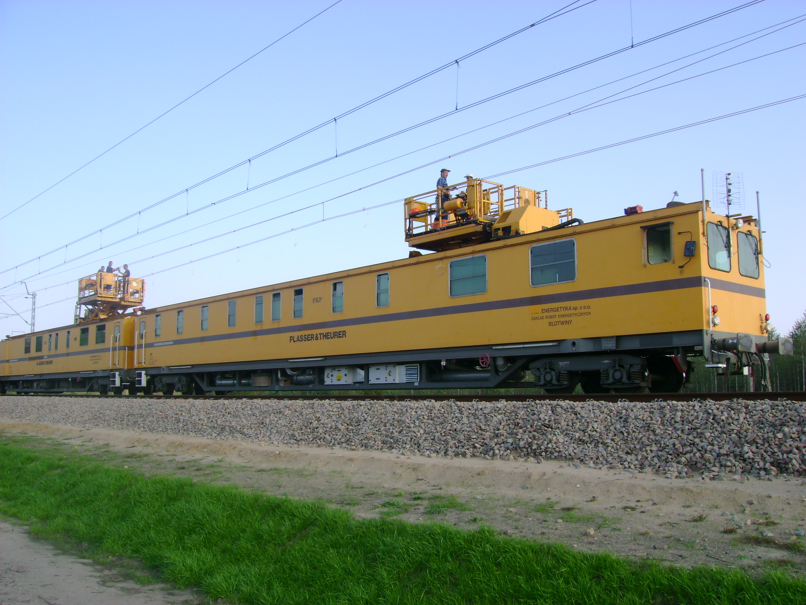 Wagony PWST-01 do potokowej wymiany trakcji elektrycznej.